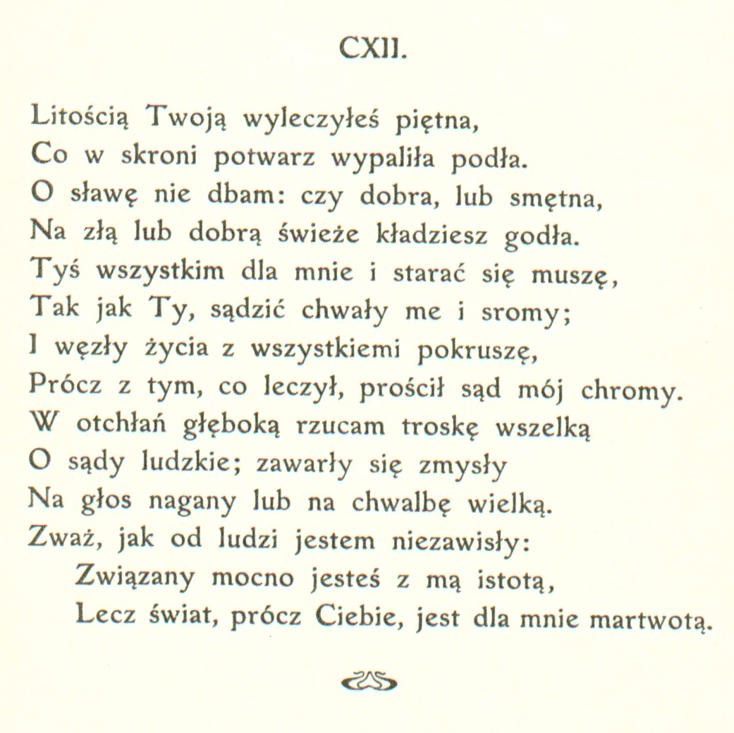 Sonety Shakespeare'a I-CXXXIV i CXXXVII-CLIV tłumaczenie Maria Sułkowska (MUS) sonet 112 strona 126